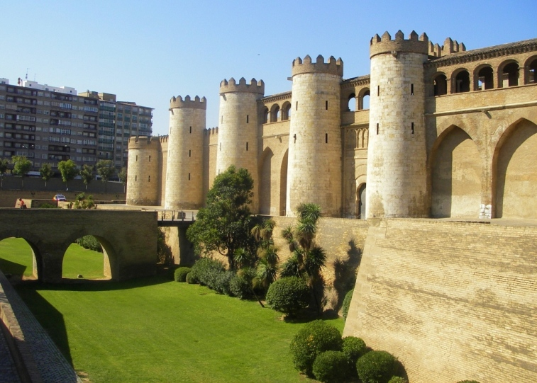 Castello di Zaragoza. Aljaferia.